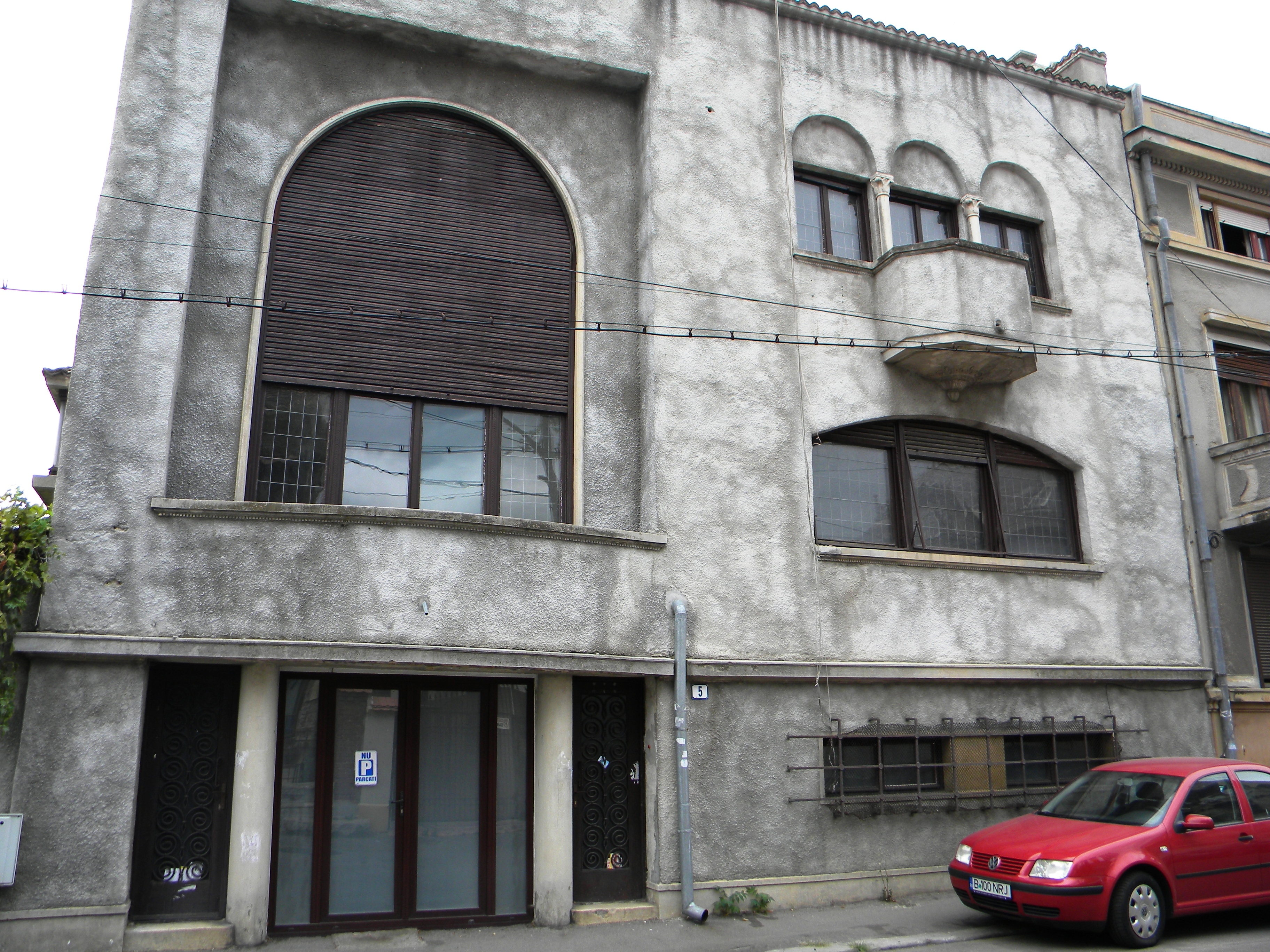 Bucuresti, Romania, Casa pe Str. Vasile Alecsandri nr. 5; B-II-m-B-17940